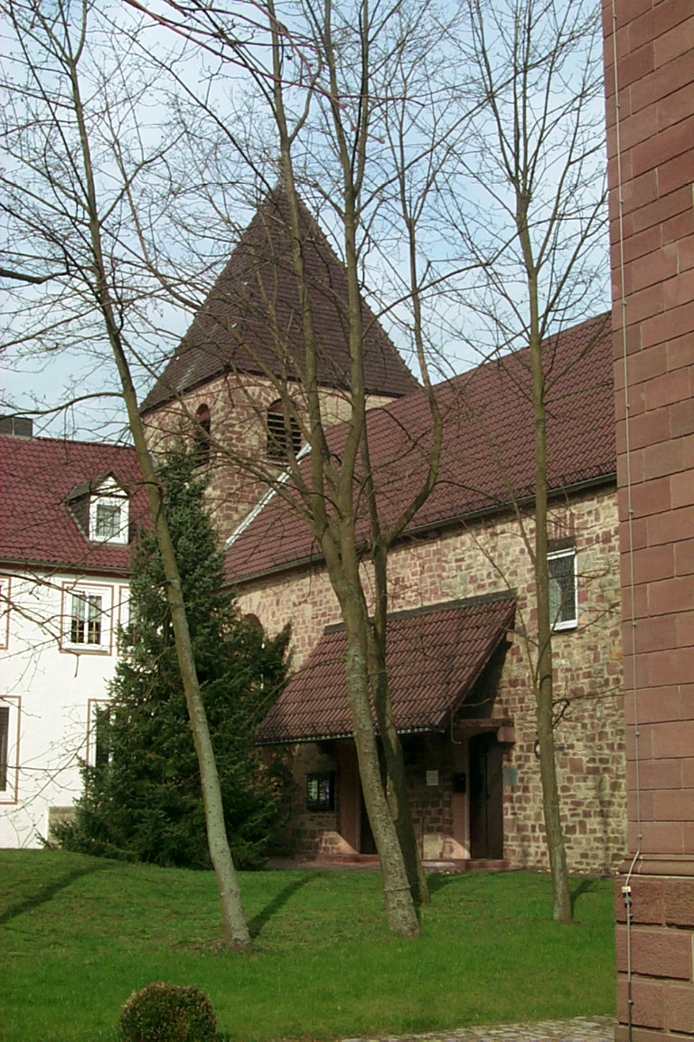 Evangelische Kirche Bitburg (Germany)